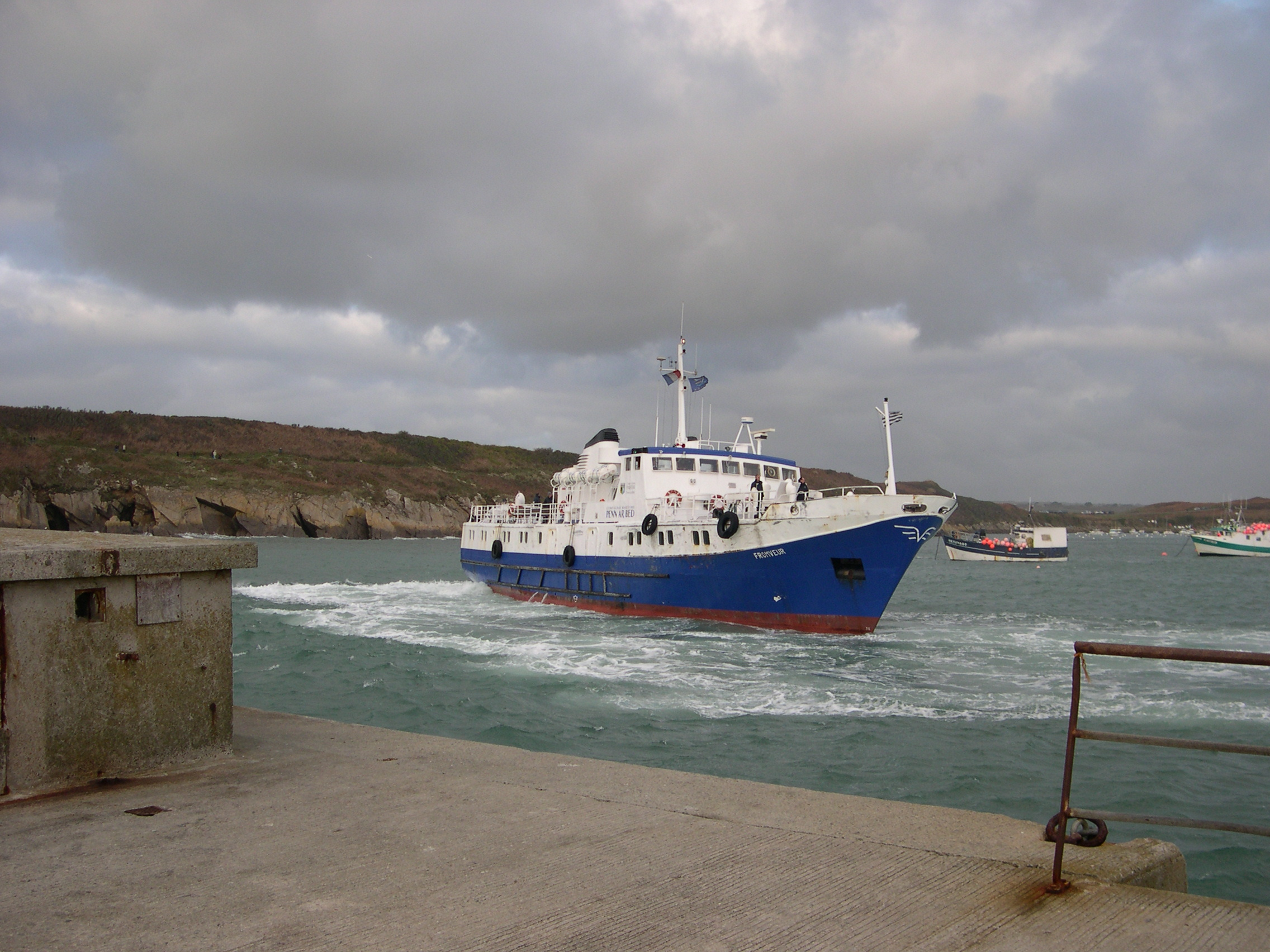 Le Fromveur de la compagnie Penn-ar-Bed quitte le port du Conquet pour rejoindre Molène IMO number 7521297